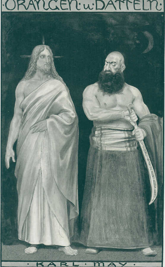 Christus oder Muhammed: Deckelbild zu Karl Mays Reiseerzählung Orangen und Datteln (Sascha-Schneider-Ausgabe)